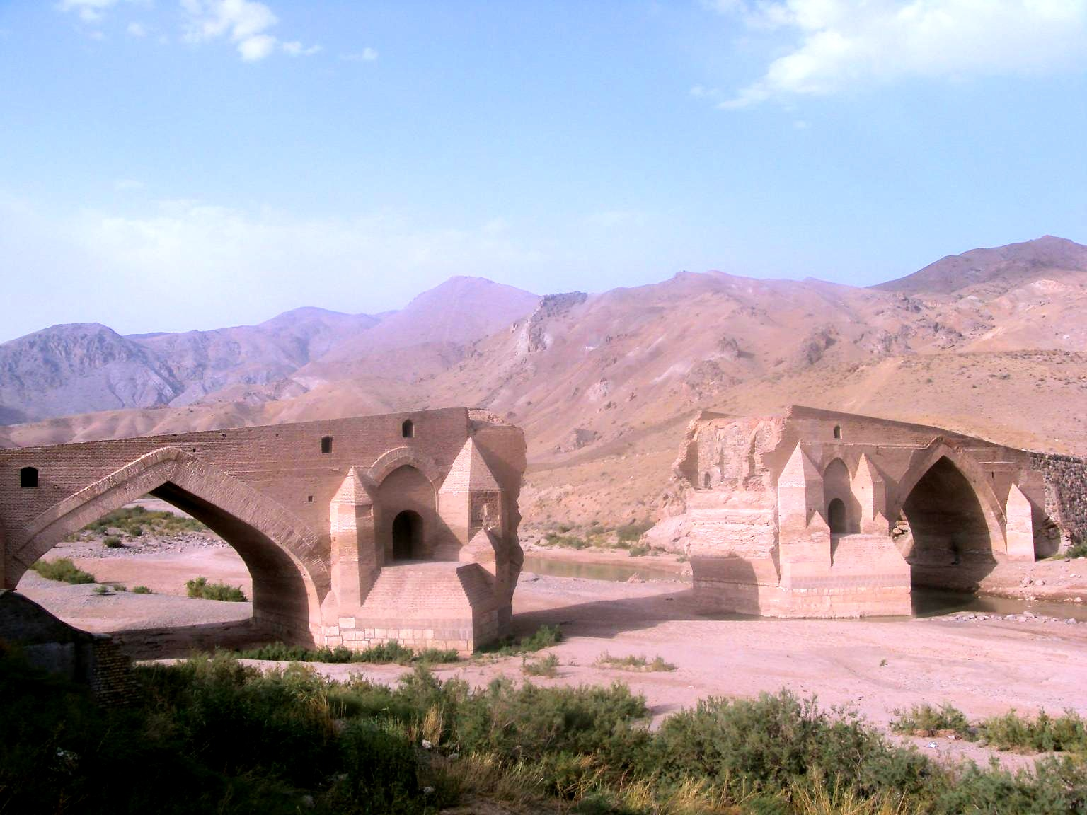 Miyaneh Pol Dokhtar, Iran (پل‌دختر میانه، ایران)